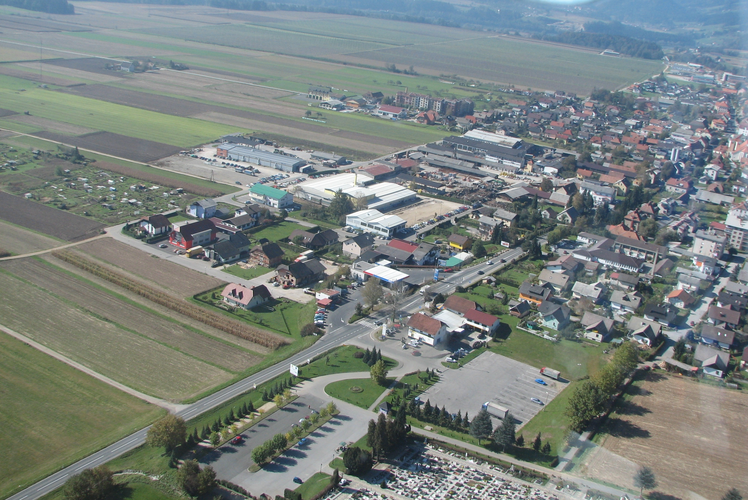 Mesto Radlje ob Dravi.